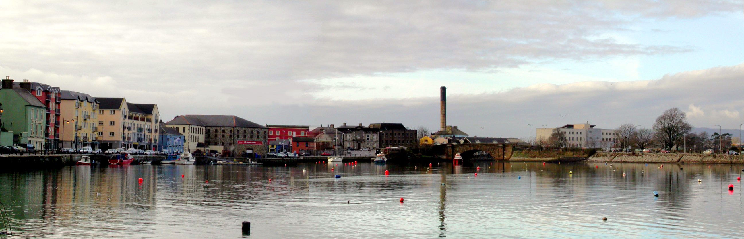 Cuan Dún Garbhán